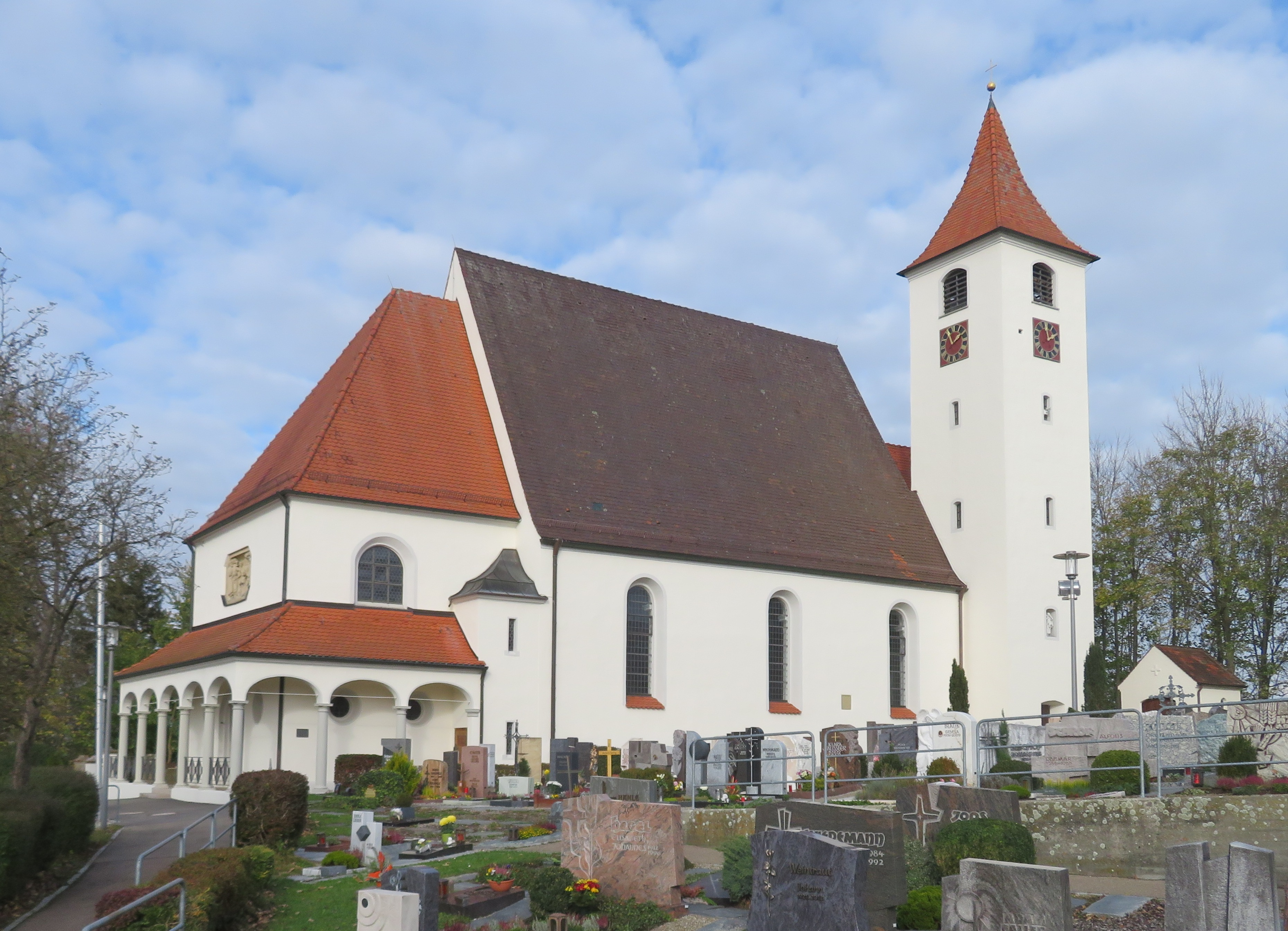 Kath. Pfarrkirche St. Martin Unterkirchberg